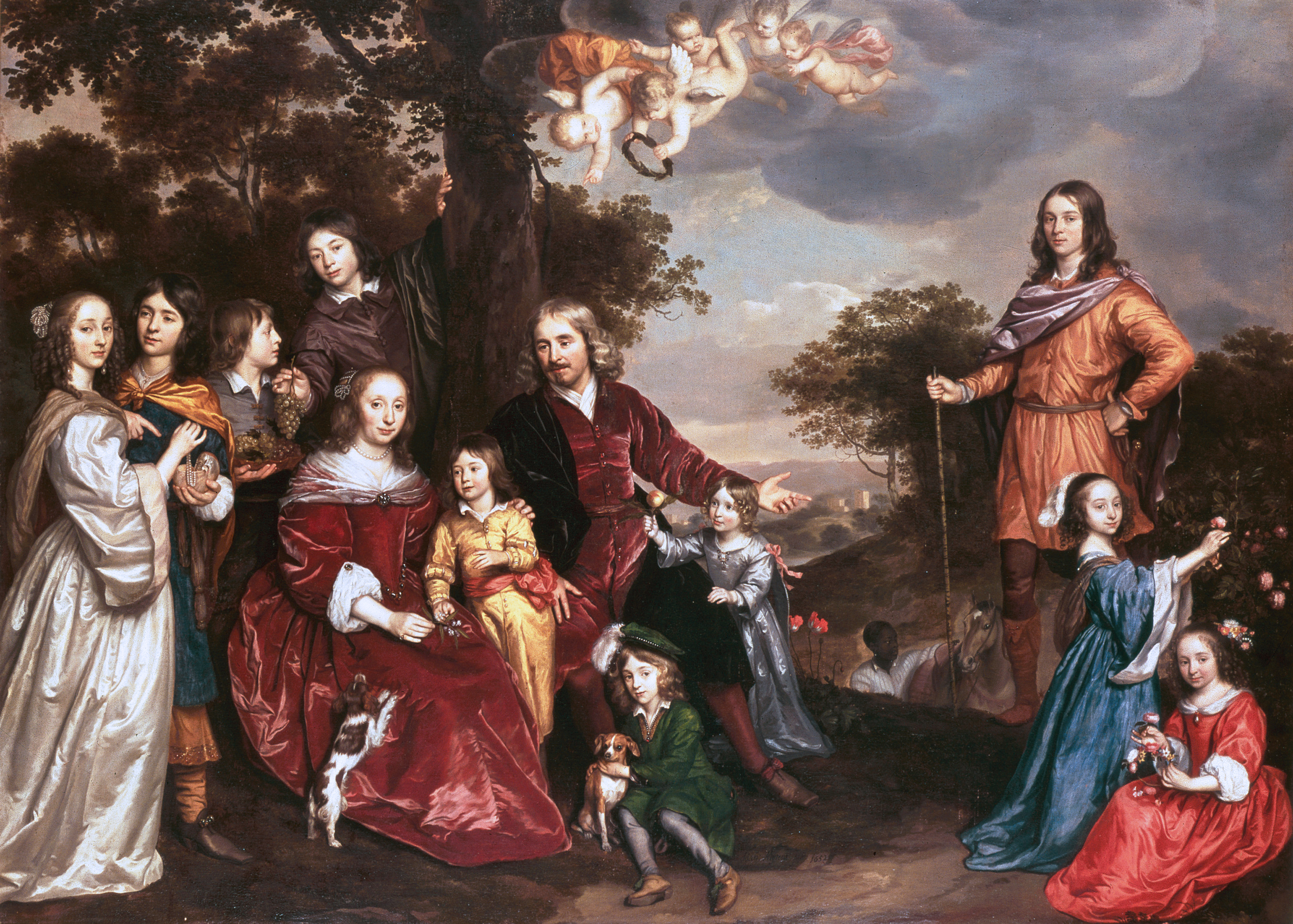 1655 (op de mouw van het toegevoegde jongste kind, Pellegrom